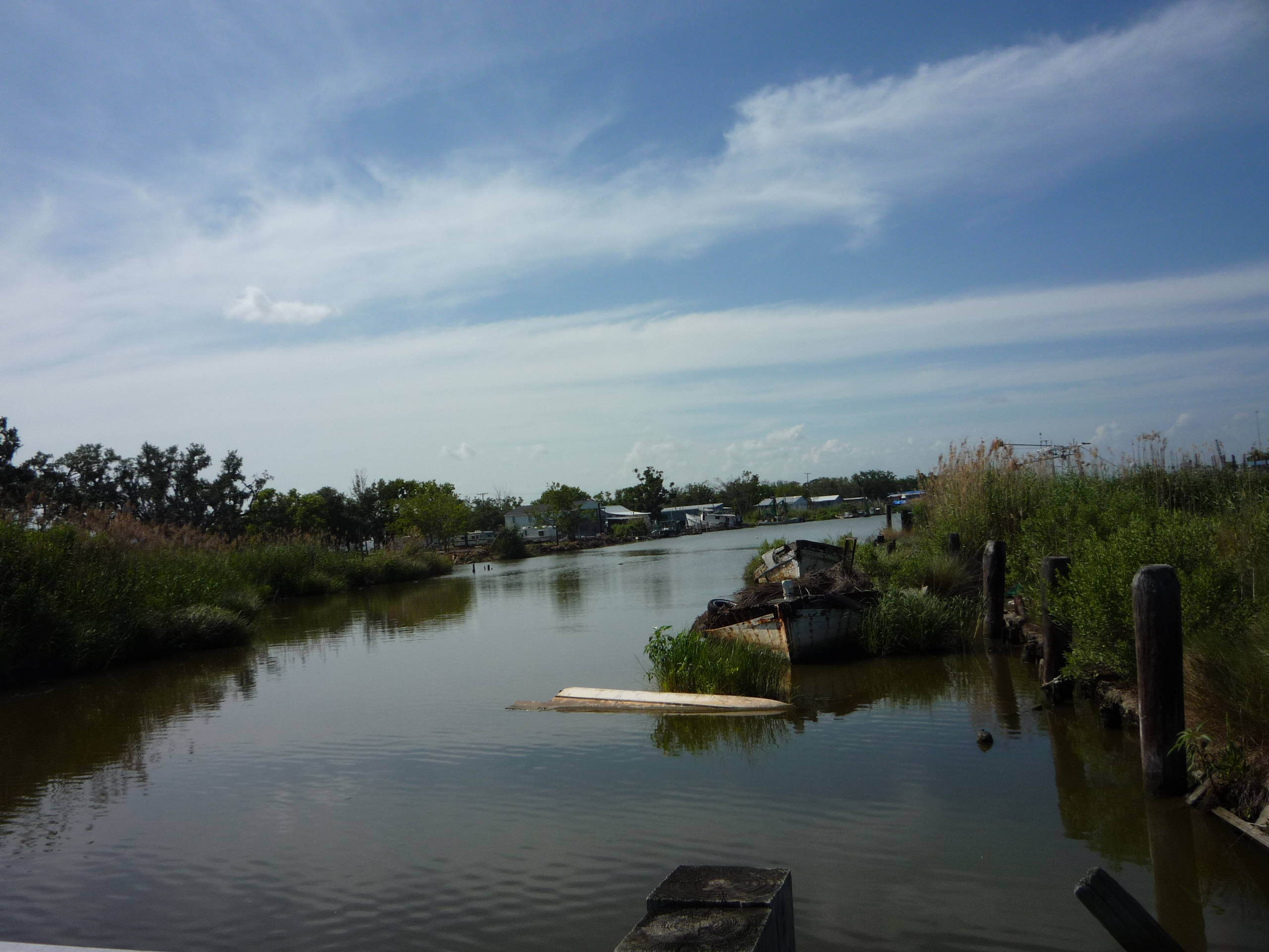 LA 57 - Dulac, LA